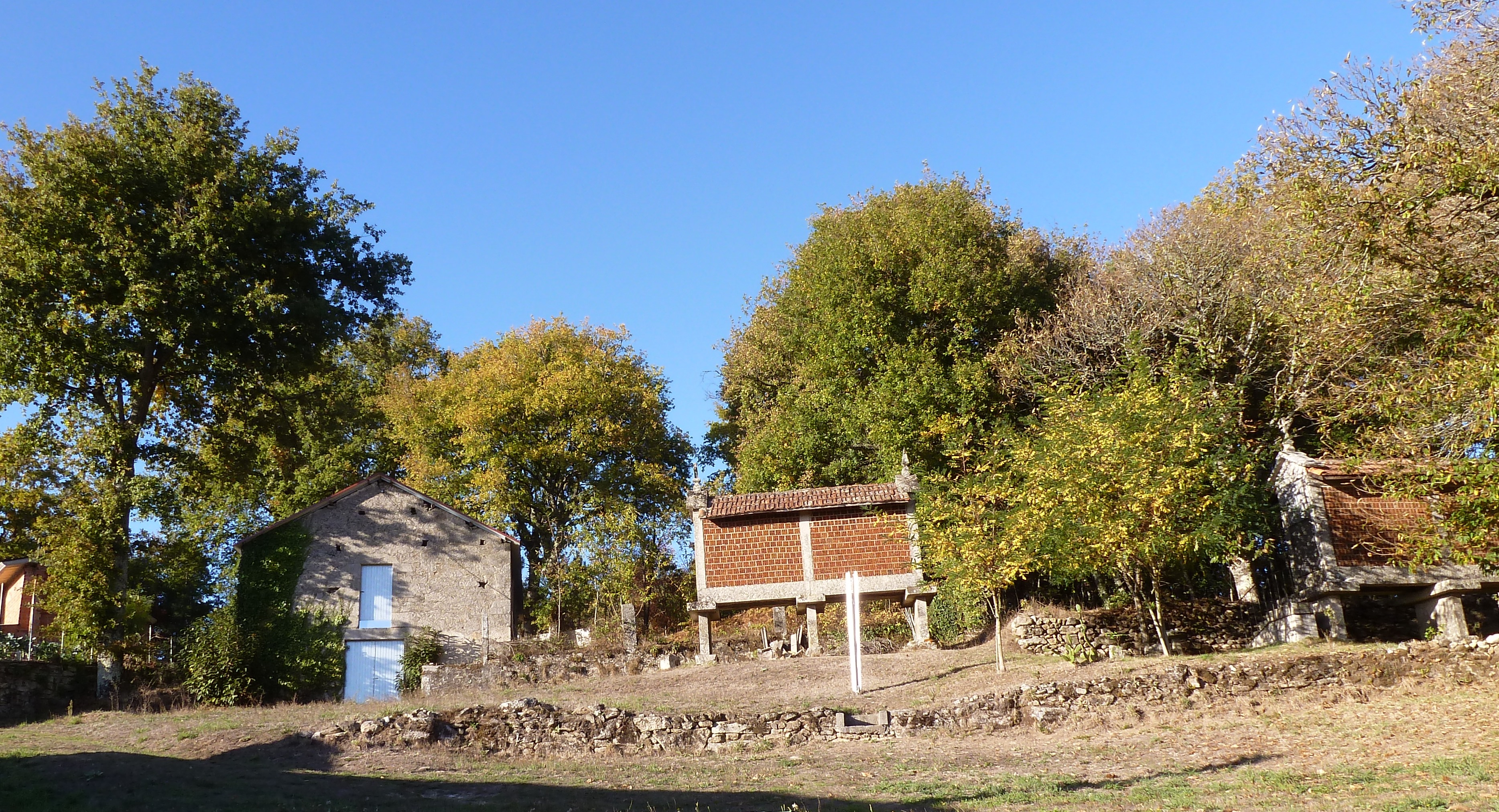 San Paio, Lousada, Carballedo